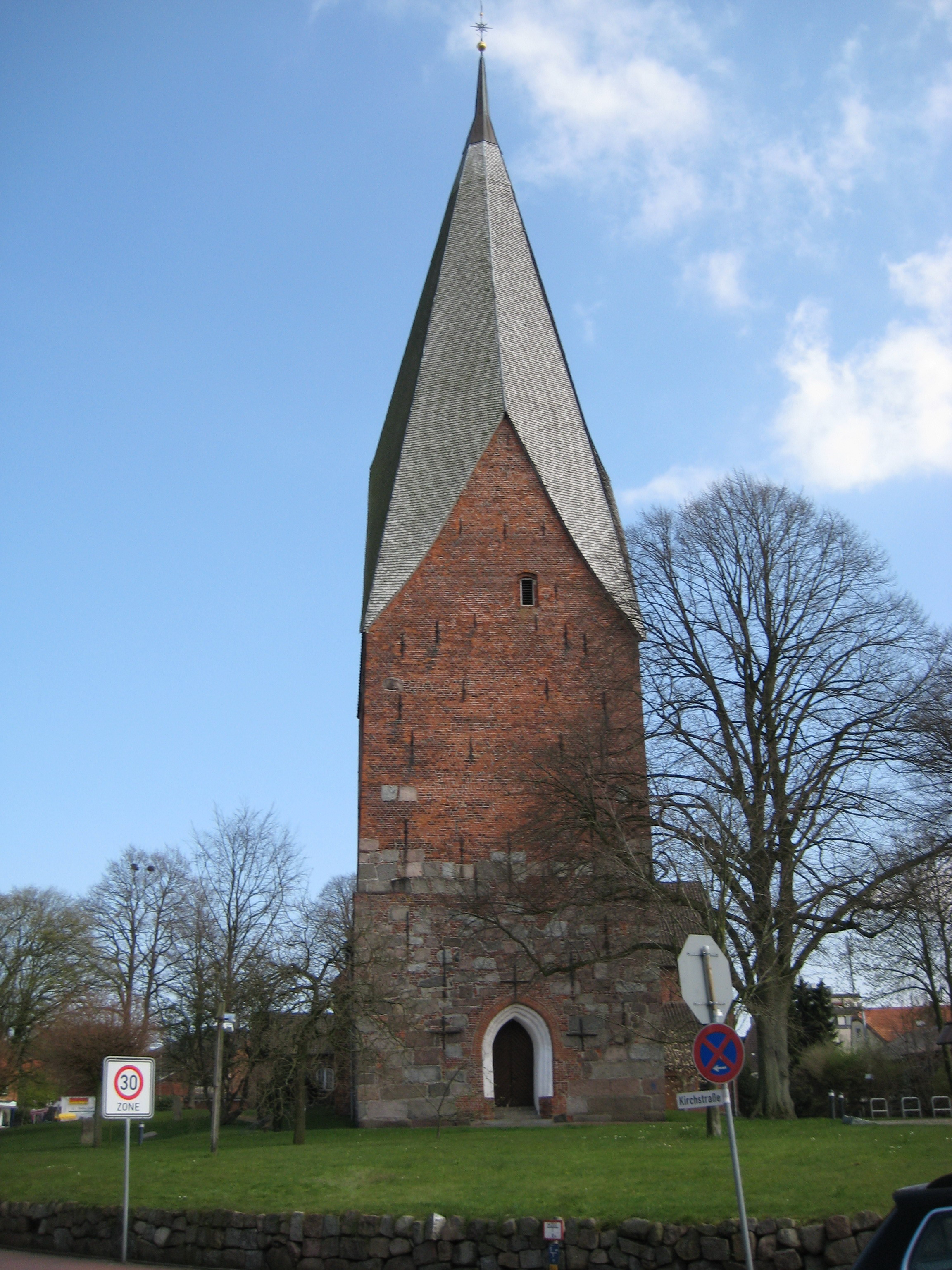 Kirchturm in Gettorf, Schleswig-Holstein, northern Germany.